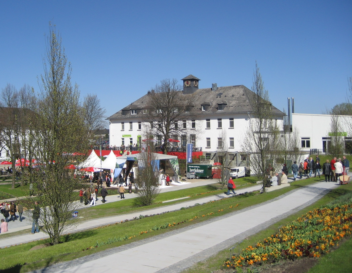 Forumsplatz Landesgartenschau Hemer. Gastronomie „Am Himmelsspiegel“ am Eröffnungstag im Hintergrund.